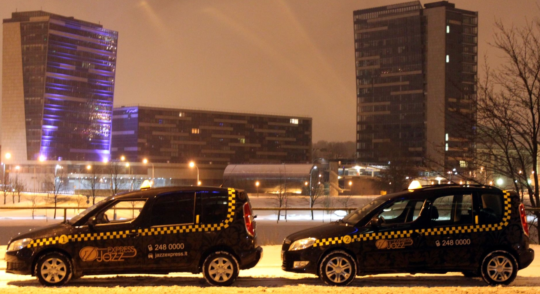 Jazzexpress taksi automobiliai Vilniuje